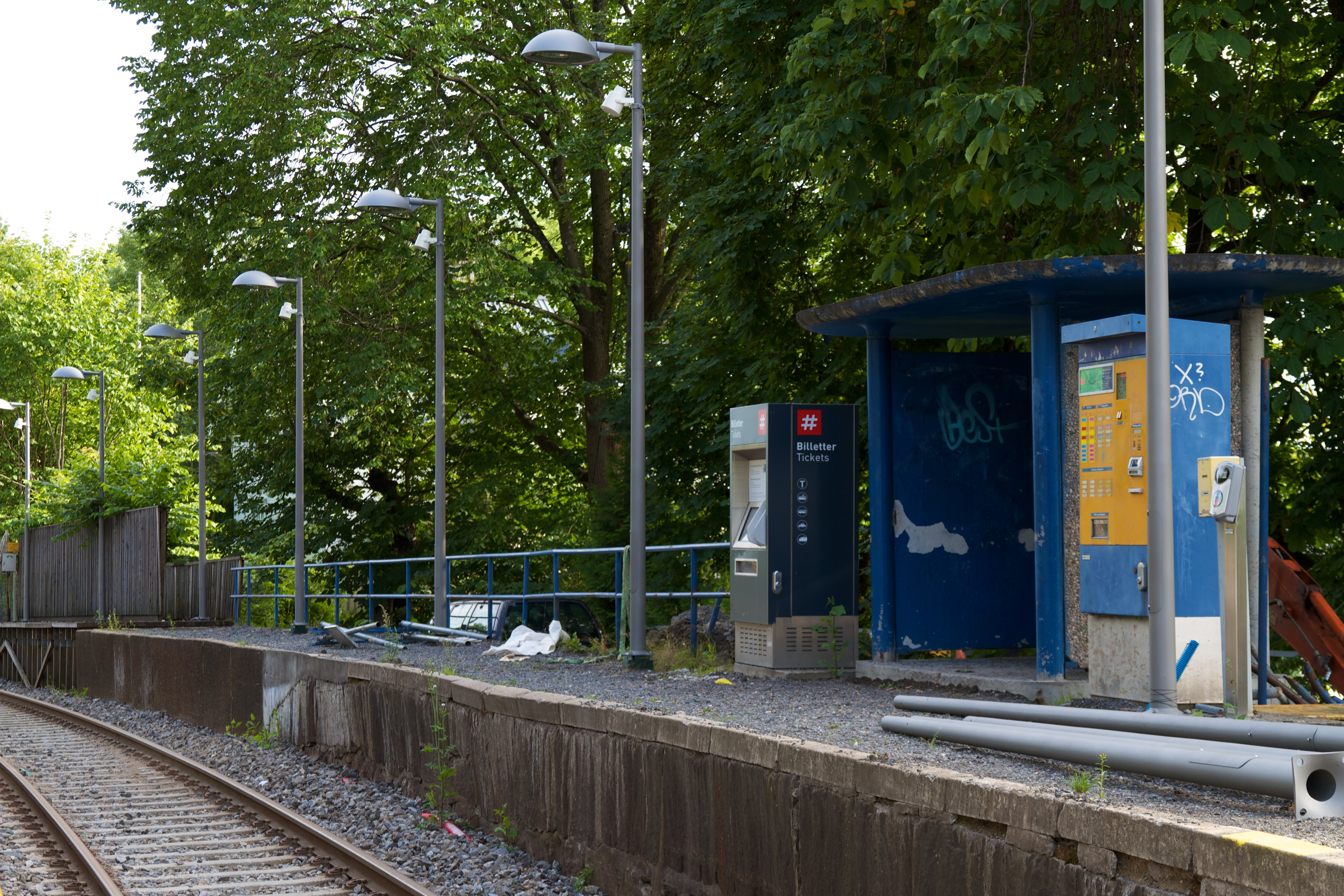 Steinerud stasjon på Holmenkollbanen.